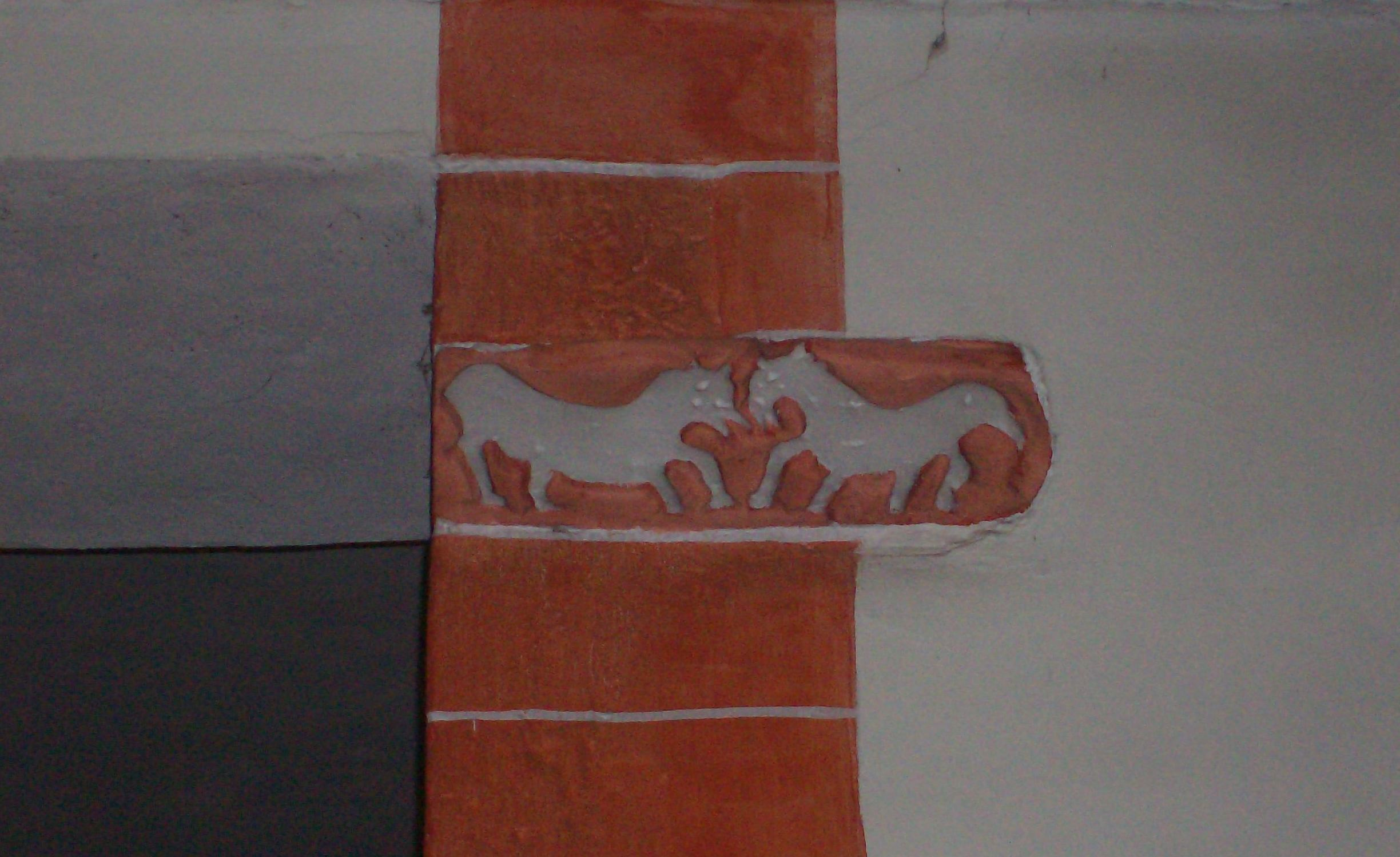 Evangelische Kirche Queckborn, Grünberg, Landkreis Gießen, Hessen, Deutschland